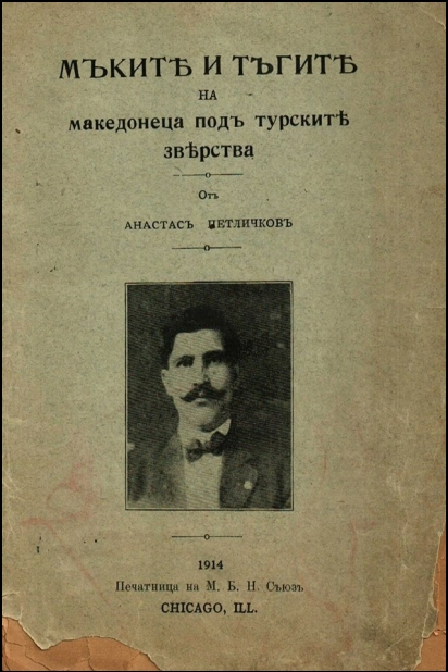 Корица на книгата „Мъките и тъгите на македонеца подъ турските зверства“.